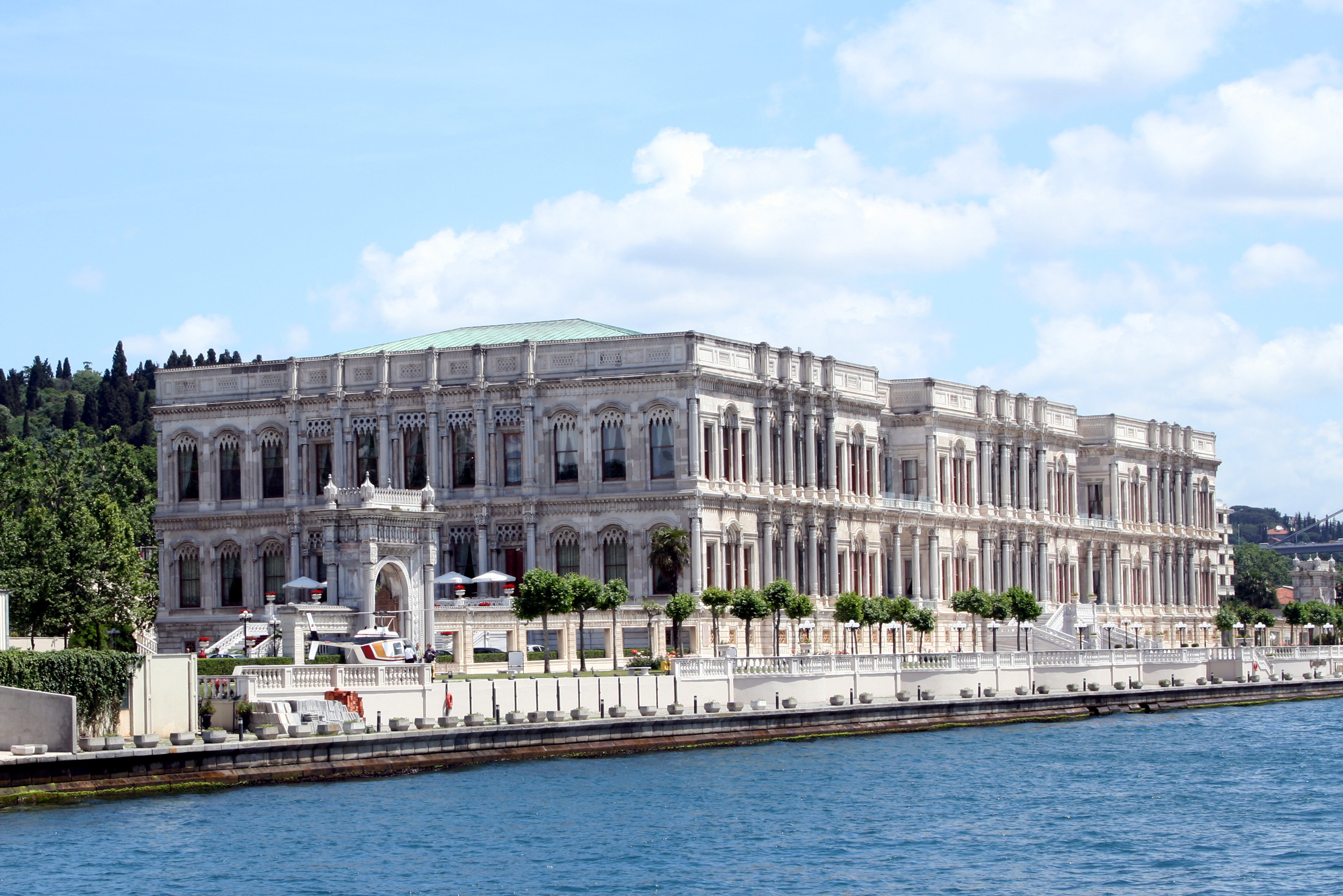 Le Palais Çırağan au bord du Bosphore à Istamboul